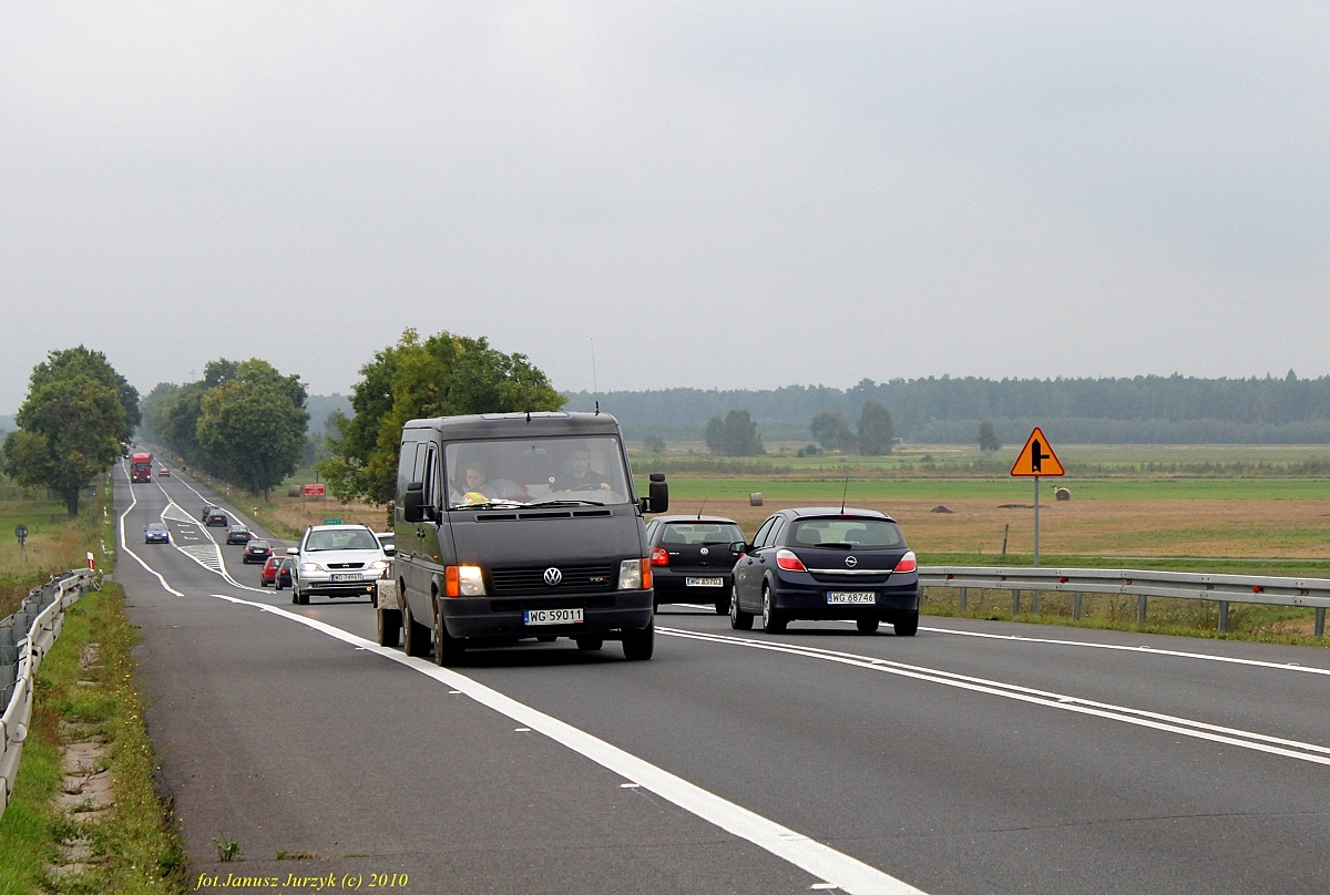 Droga Krajowa nr 17 w okolicach Lubic.